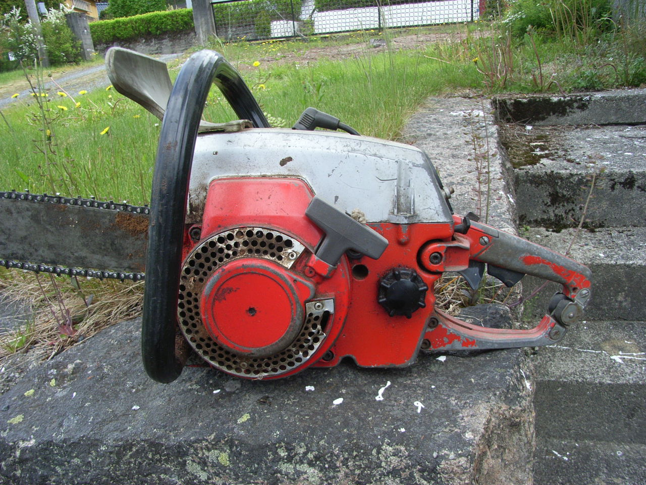 Jonsered 621